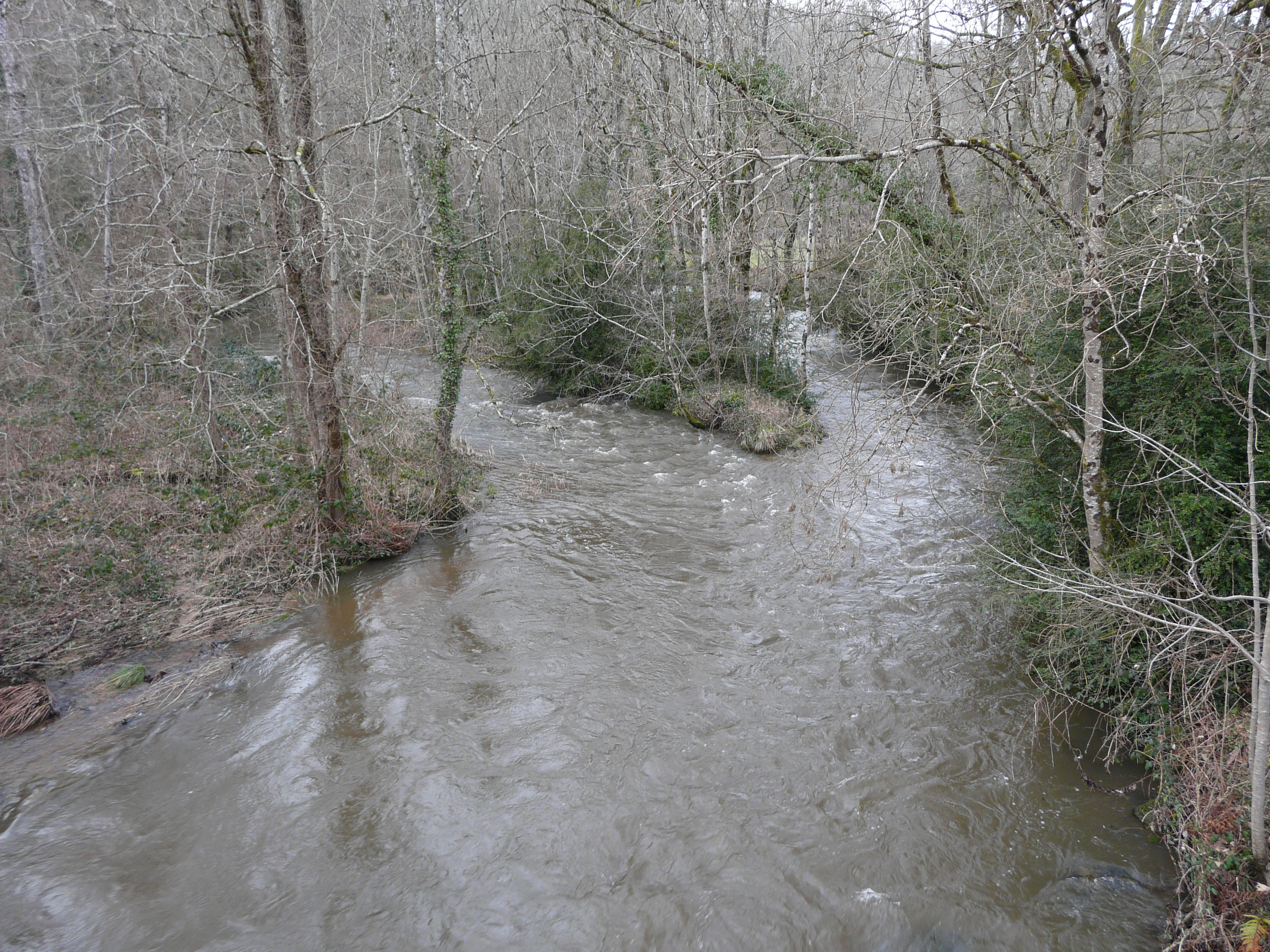 La Tardoire en amont du pont de la route départementale 699, entre Écuras (Charente) à gauche et Busserolles (Dordogne) à droite.